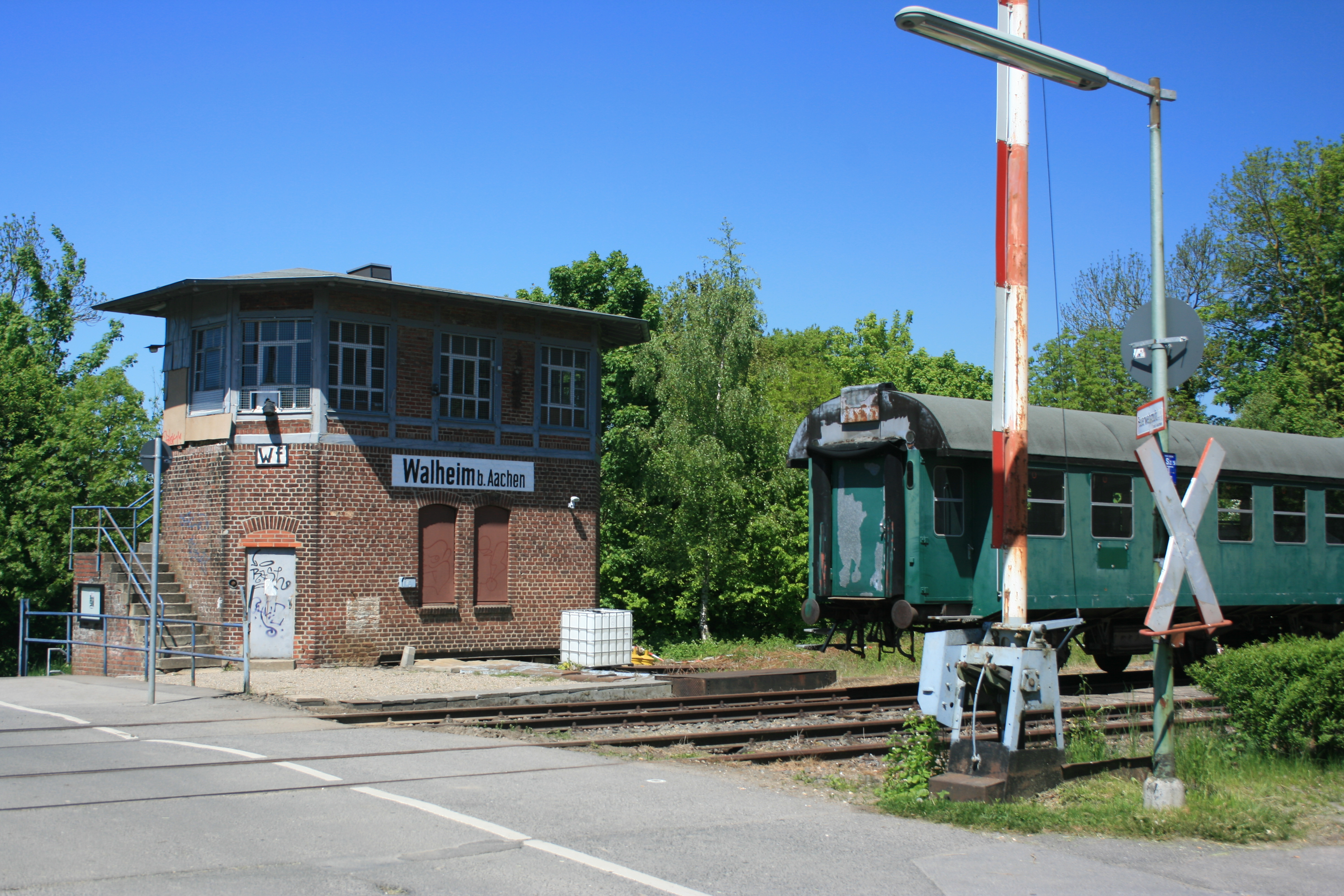 Stellwerk Walheim an der Vennbahn, 9 km von Aachen, Deutschland (Zone 32).